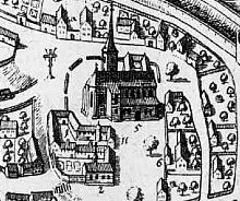 Ausschnitt aus dem Stadtplan von Heiligenstadt 1646 mit dem Stiftsberg und der St. Martin-Kirche (Erklärung: 5= St. Martin Stift, 6: Probstei (heute Bergkloster), 2= St. Laurentiuskapelle (heute im Mainzer Schloss), 11= Kanzlei (heute Mainzer Schloss))